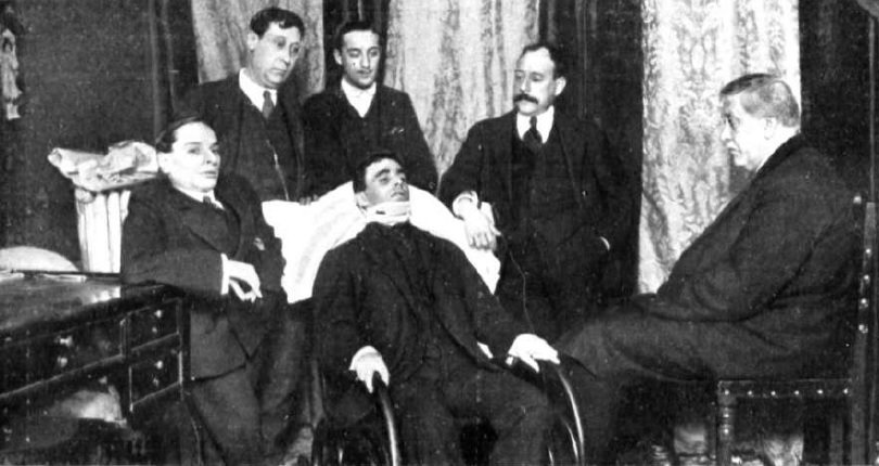 Fotografía que muestra al matador de toros español Machaquito con su tertulia en el hotel en el que se alojaba tras sufrir una herida en los ruedos.